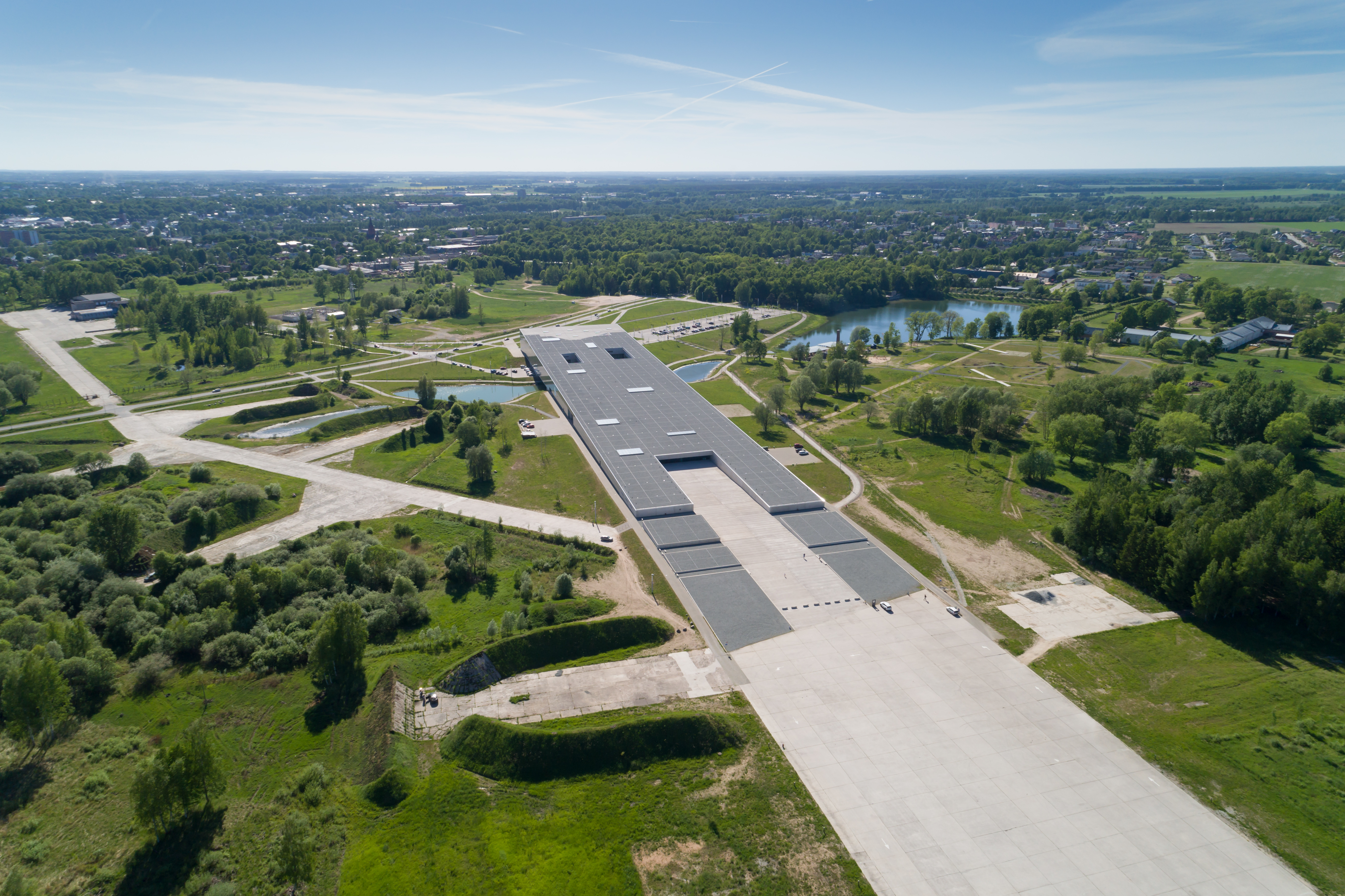 Eesti Rahva Muuseumi peahoone